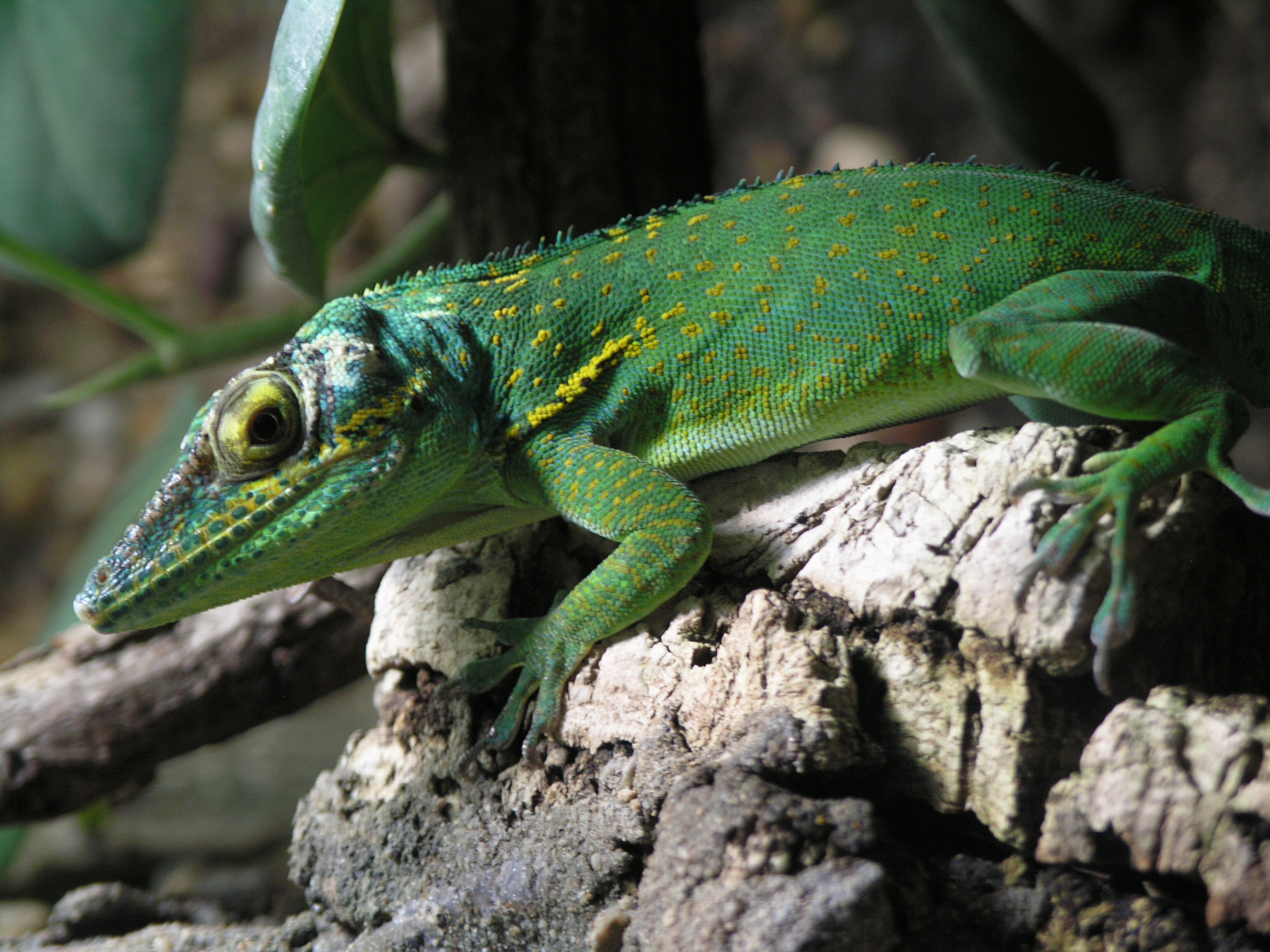 Zoo Praha